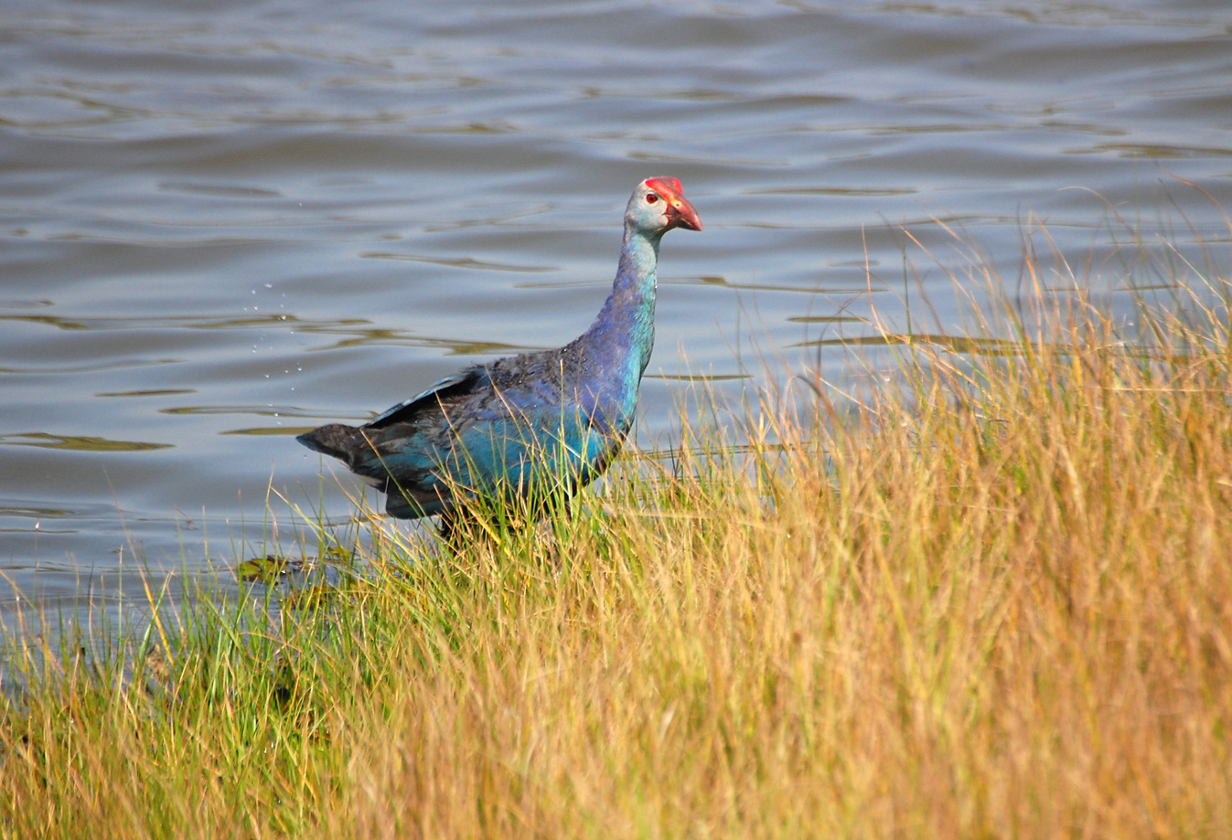 Purple Smamphen. shot at Thommana, Irinjalakuda, Kerala, India.